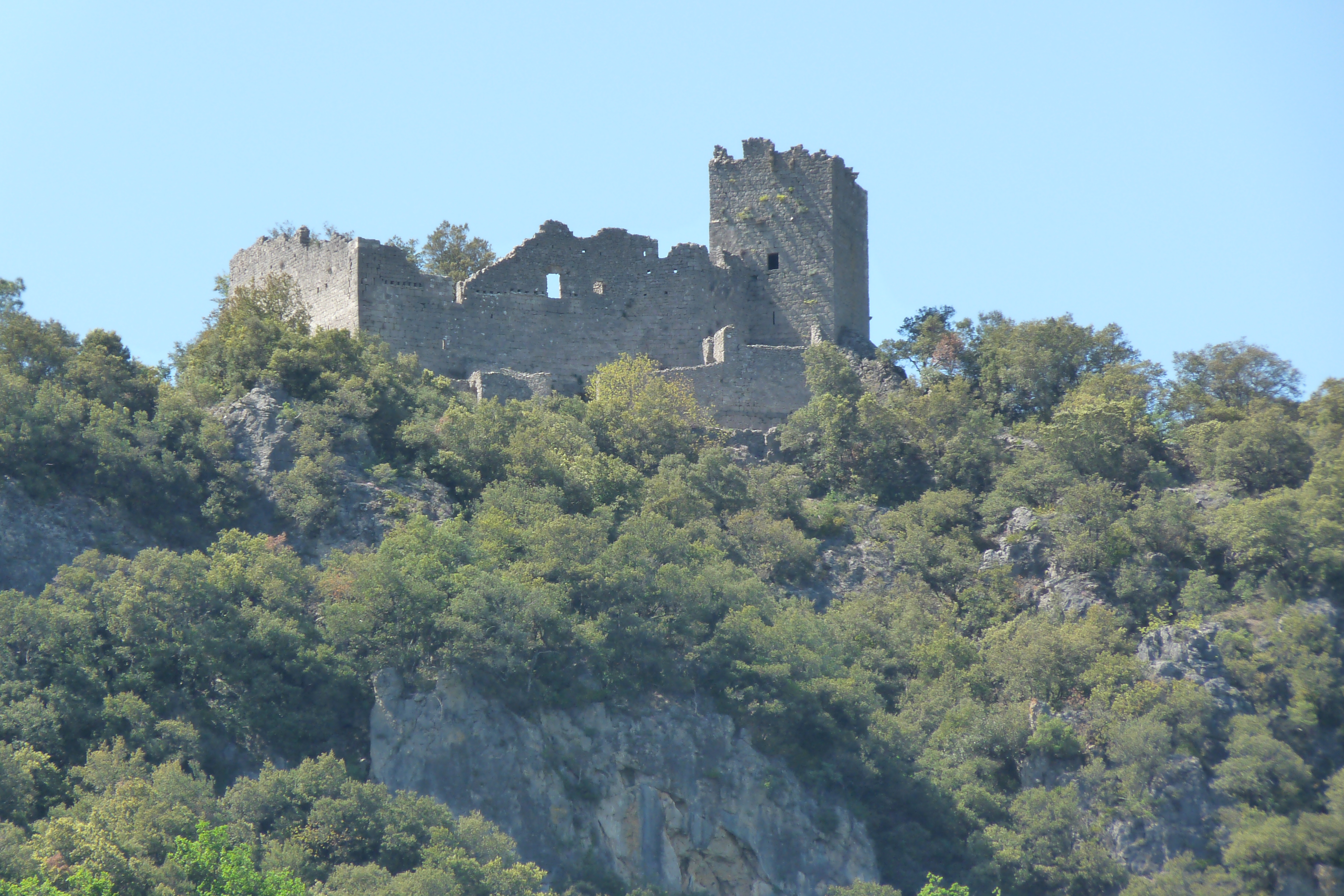 Vue générale du château de Fressac